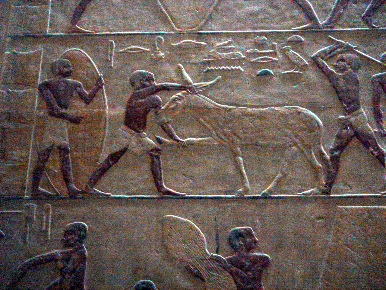 Detalle de un relieve que muestra una mula que se niega a avanzar. Mastaba de Ti en Saqqara (Egipto).